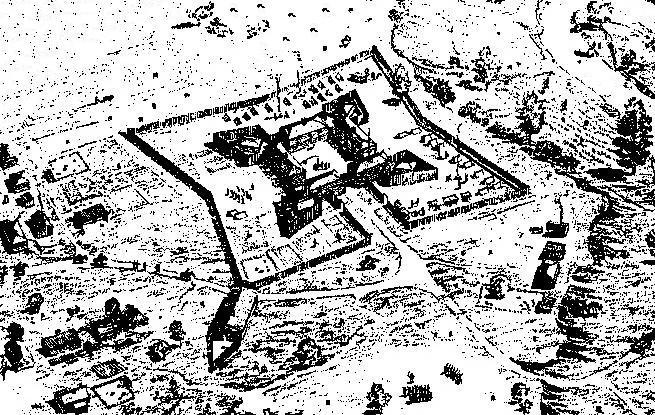 Iconographie représentant le fort Le Boeuf situé en Nouvelle-France en 1754.